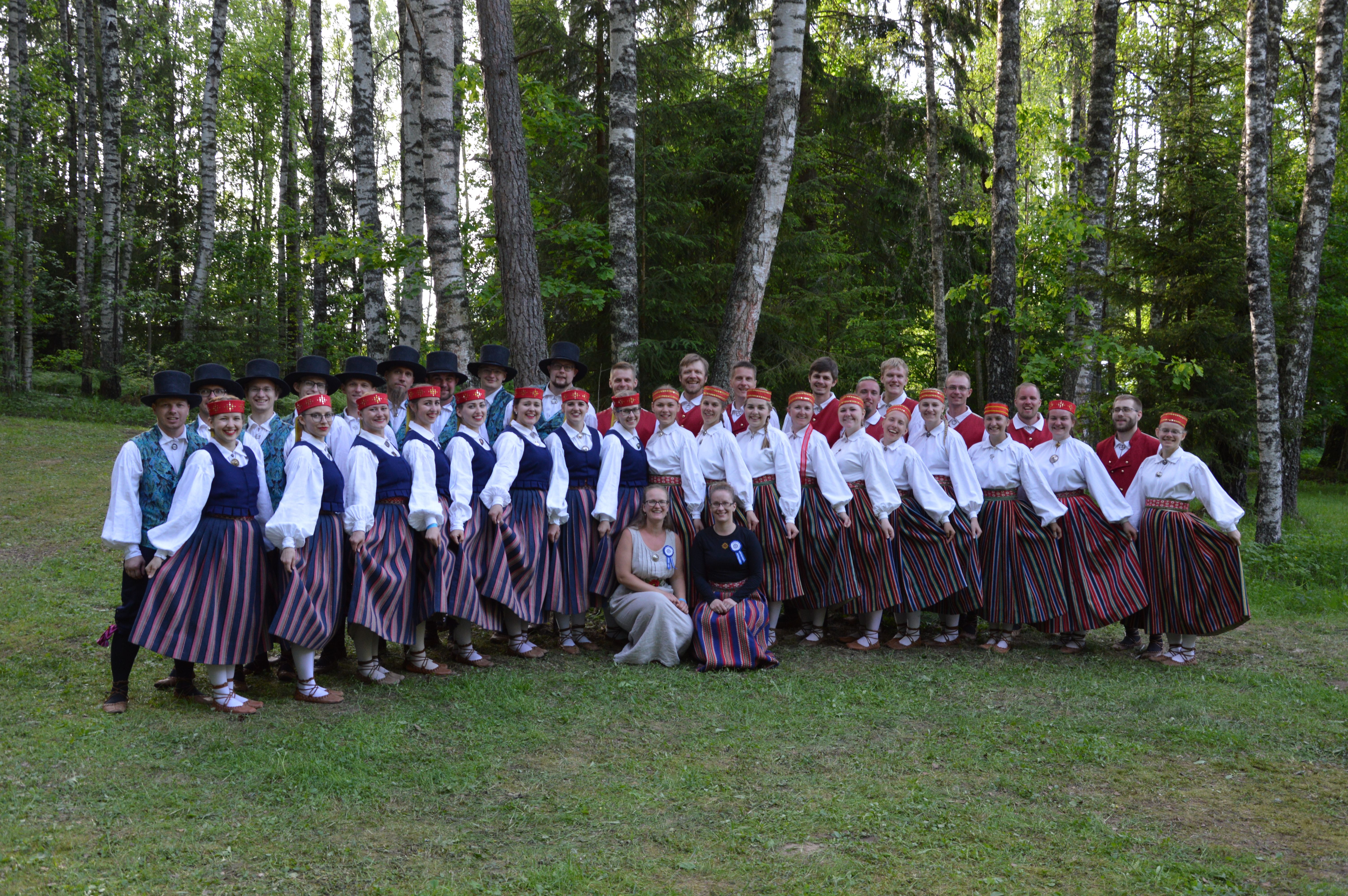 Torbikud III Kagu-Eesti tantsupeol 2018. aastal.